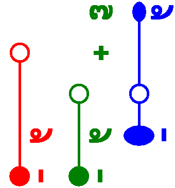 タイ語の声調